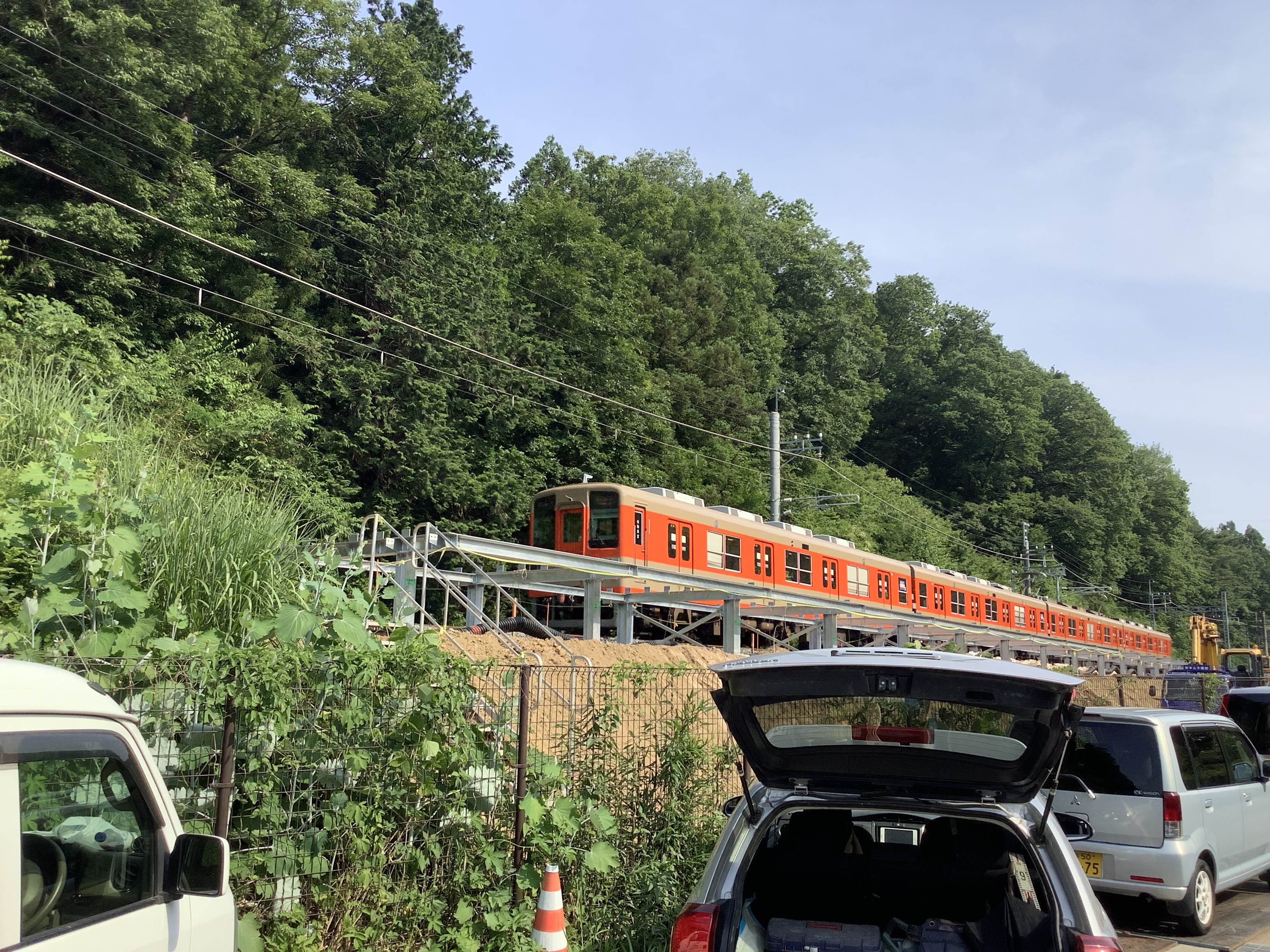 開業前の駅、東武東上線みなみ寄居駅を現地撮影。2020年6月9日昼頃。寄居町にて。